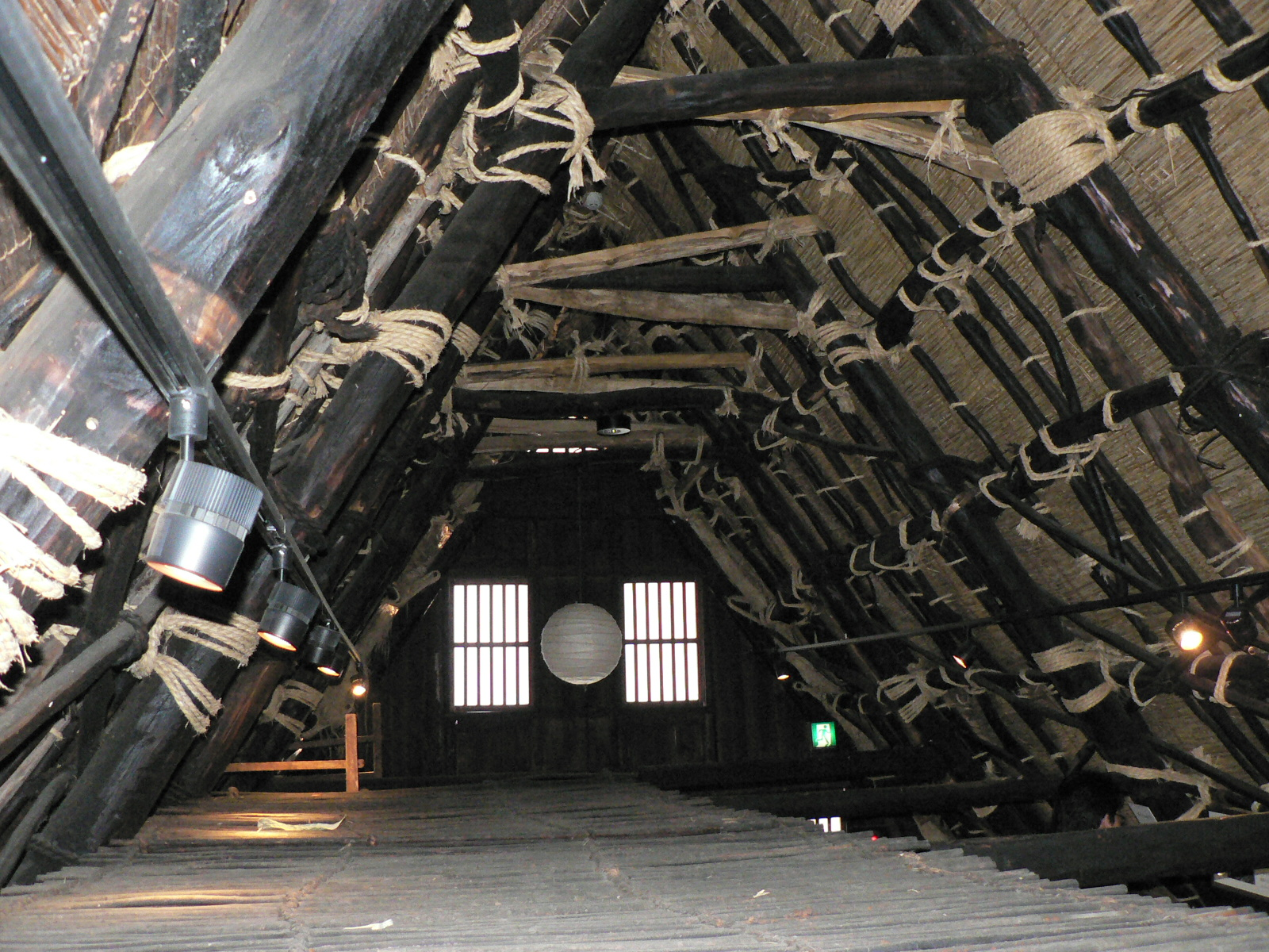 富山県南砺市（旧平村） 越中五箇山 相倉合掌集落 3階屋根裏の構造